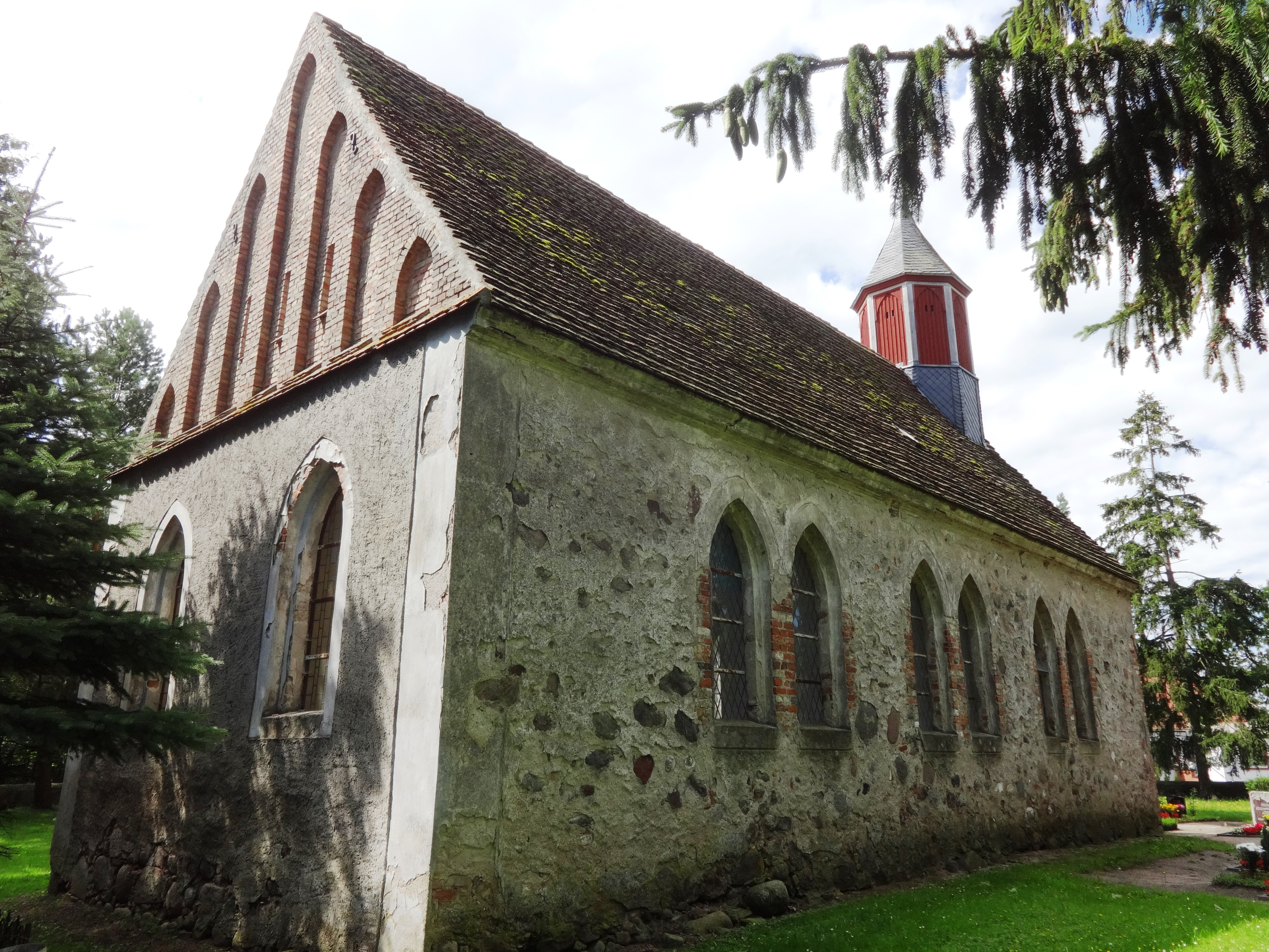 Die Feldsteinkirche in Neuenkirchen bei Anklam entstand vermutlich in der zweiten Hälfte des 13. Jahrhunderts. In seinem Innern steht vor dem Altar eine Grabplatte von Johannes Lughe mit seiner Frau. Das Epitaph stammt aus dem Ende des 14. Jahrhunderts.